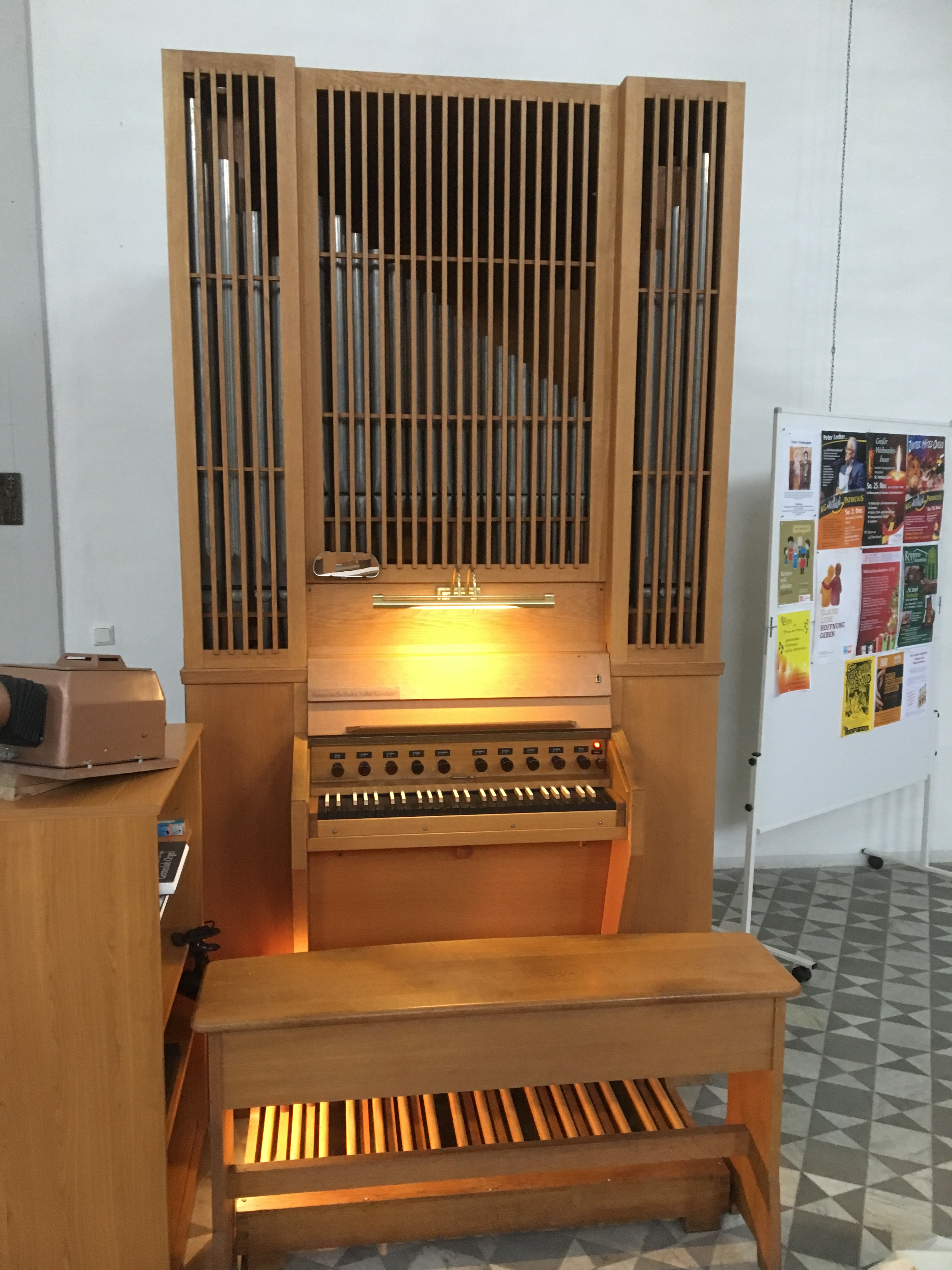 Seifert-Orgel der St.Josefskirche